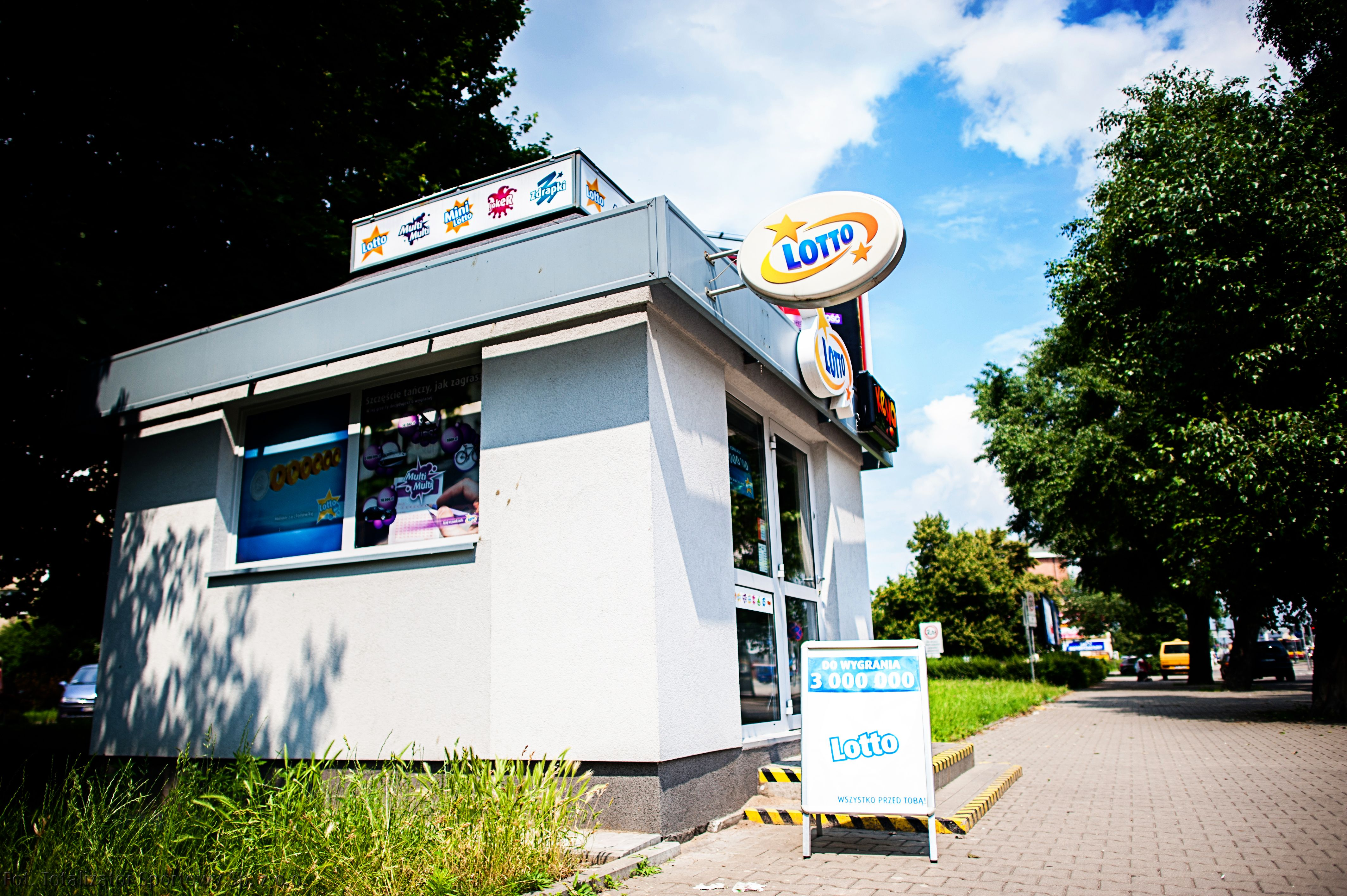 Kolektura LOTTO, w której można dokonać zakupu zakładów gier liczbowych oferowanych przez Totalizator Sportowy.